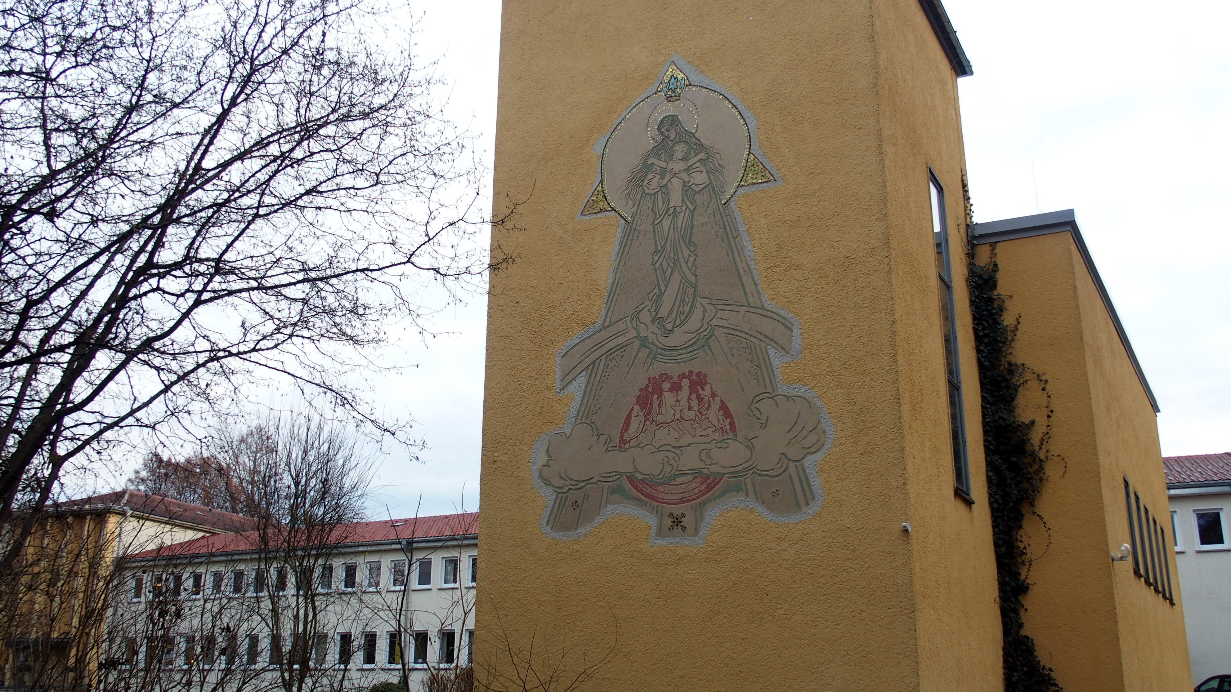 Regina Pacis (Königin des Friedens) Fresko, Kapelle Leutkirch im Allgäu; Sgraffito von Alfred Vollmar